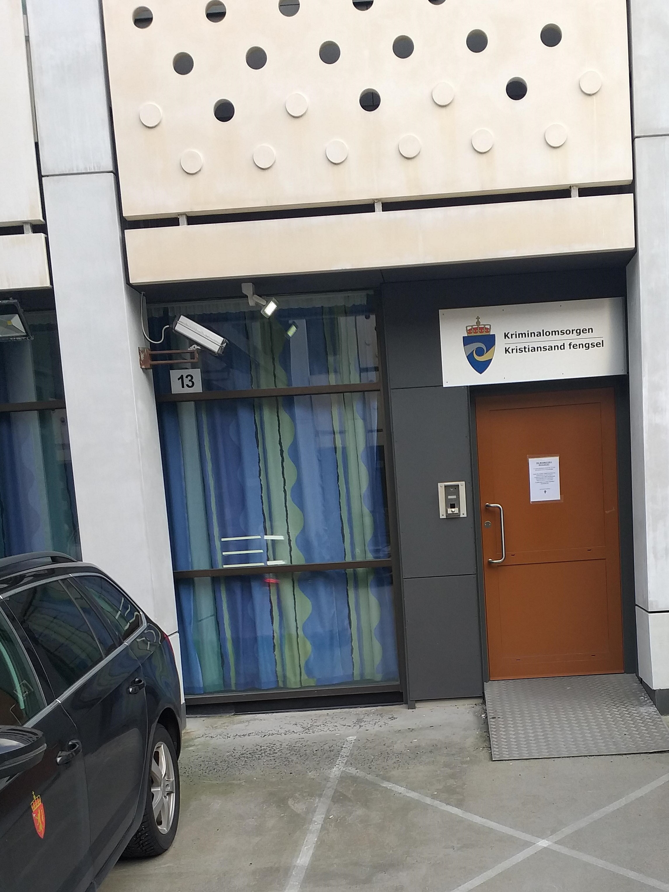 Inngang fra bakgård.